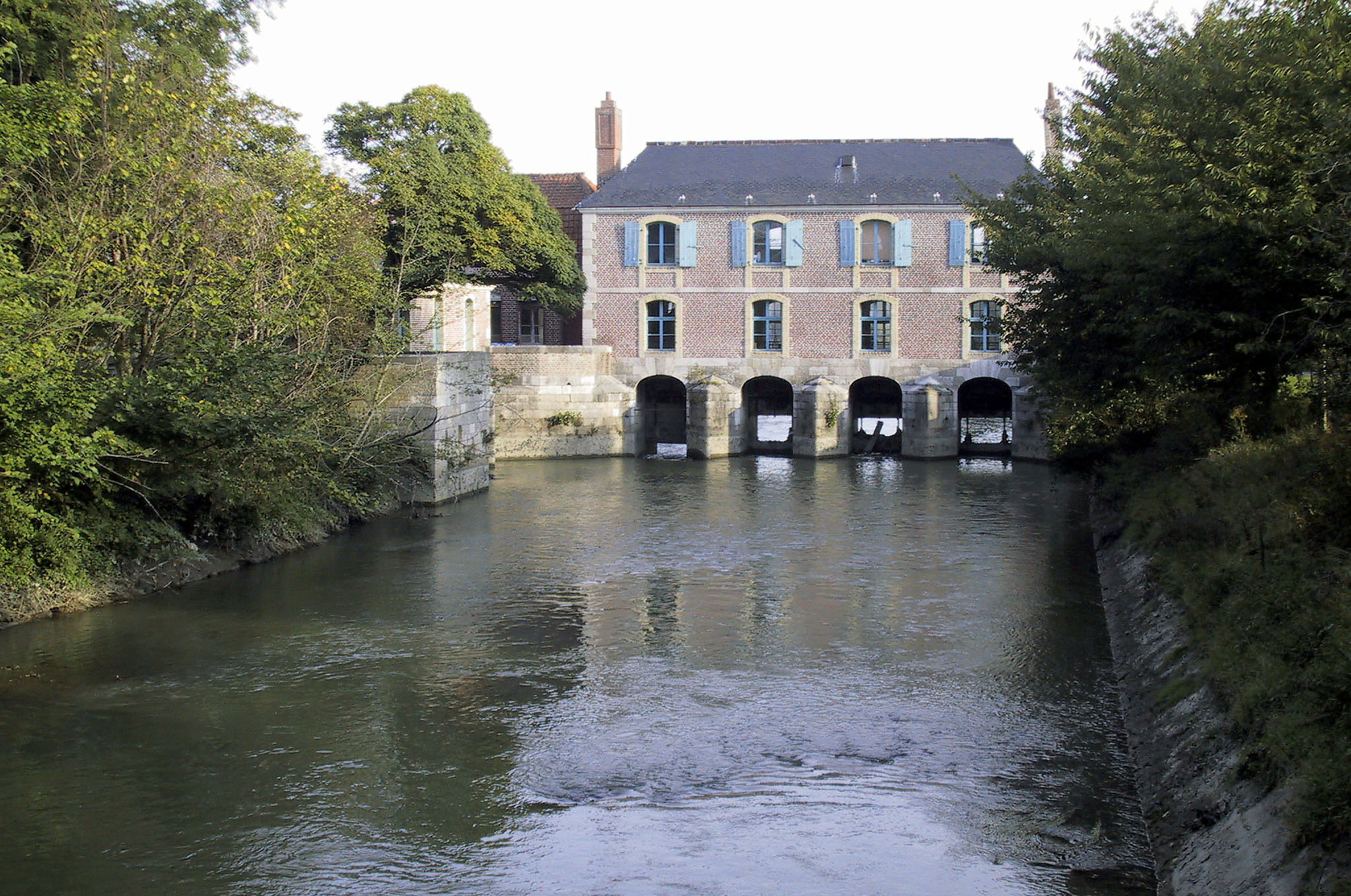 La maison du Parc Naturel régional (ex battelerie), au dessus du fleuve Aa, près du Canal de Noeufossé